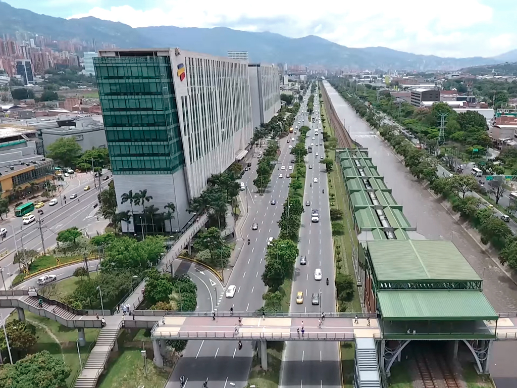 Estación Industriales (Metro de Medellín)